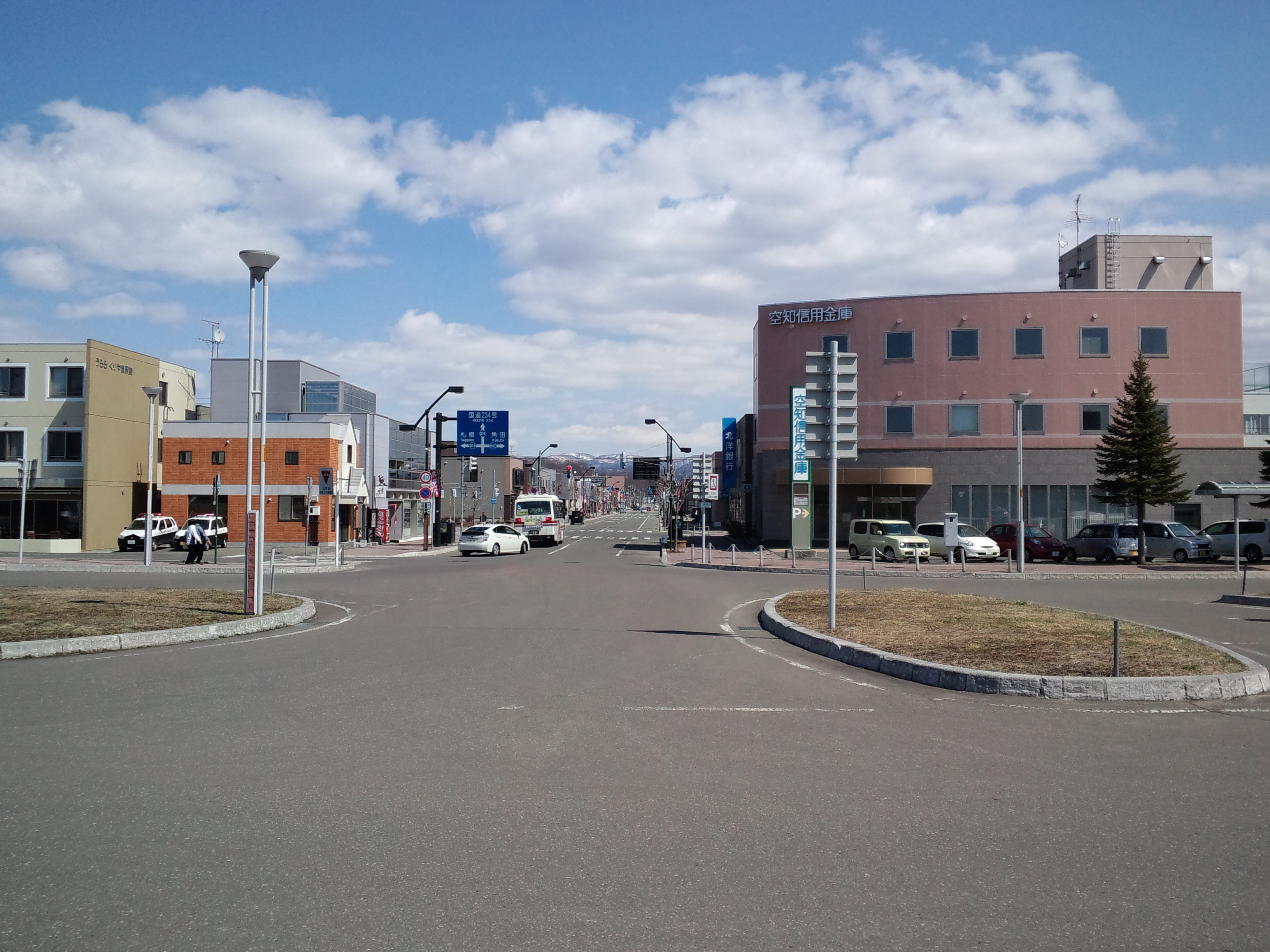 栗山駅前市街地